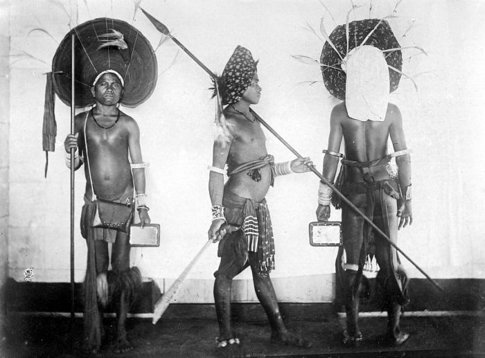 Repronegatief. Drie jonge Molukers van de Tanimbar-eilanden in feestkleding met hoofdtooien en speren